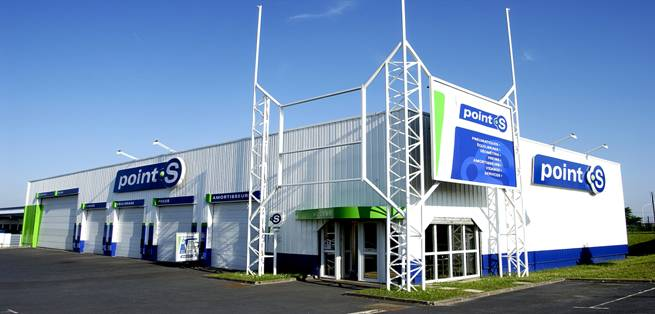 Billede af Point S lokalcenter.